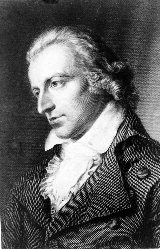 Stahlstich Porträt Schiller nach Ölgemälde